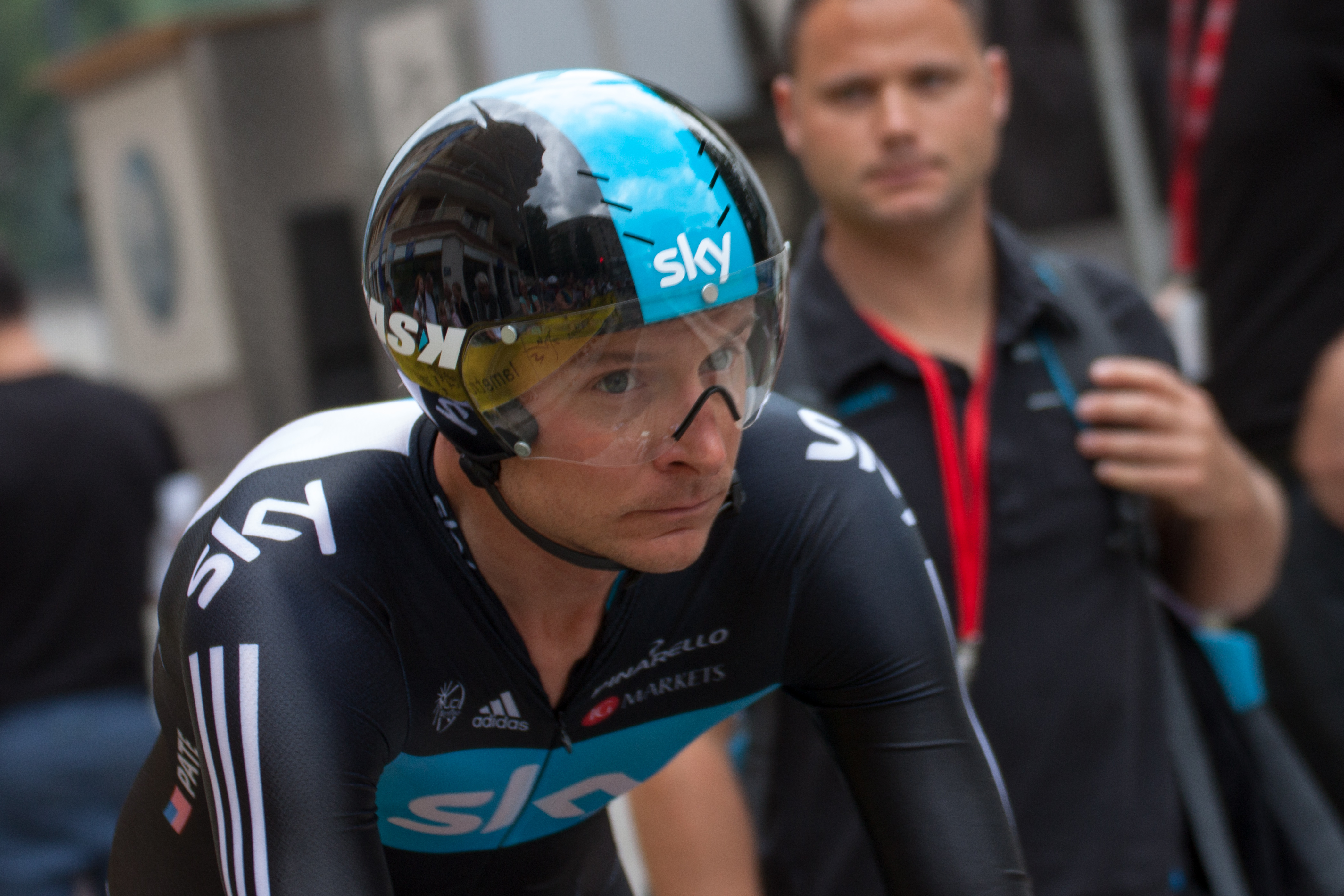 Danny Pate au Prologue du Critérium du Dauphiné 2012